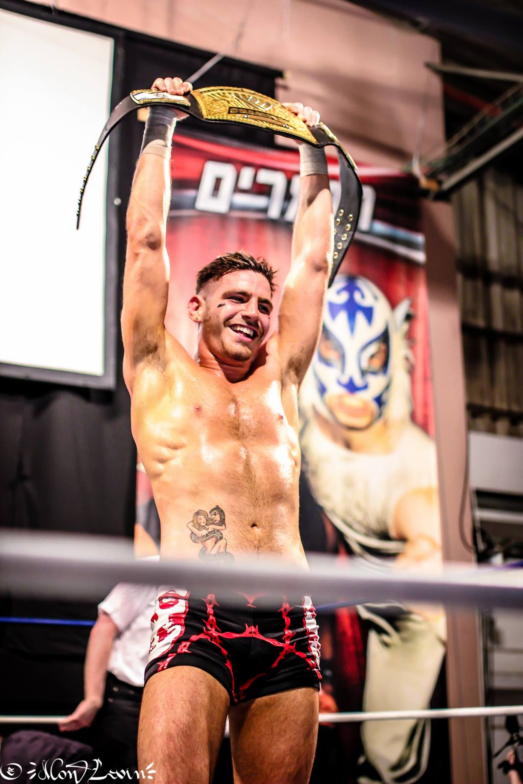 אלוף הליגה השני - מקס האבוק, לאחר הזכיה בתור במופע השישי